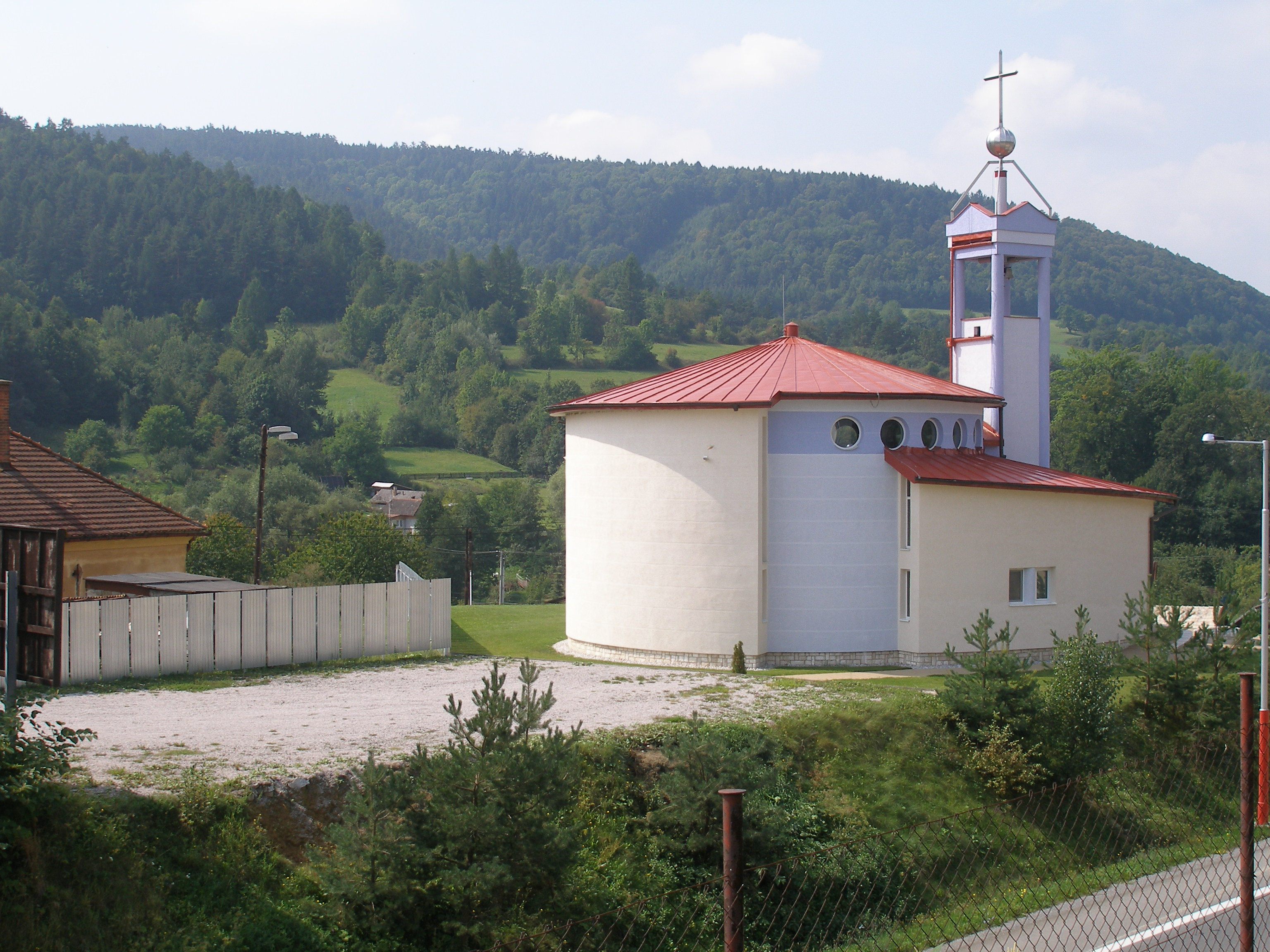 Šarišská obec Hendrichovce